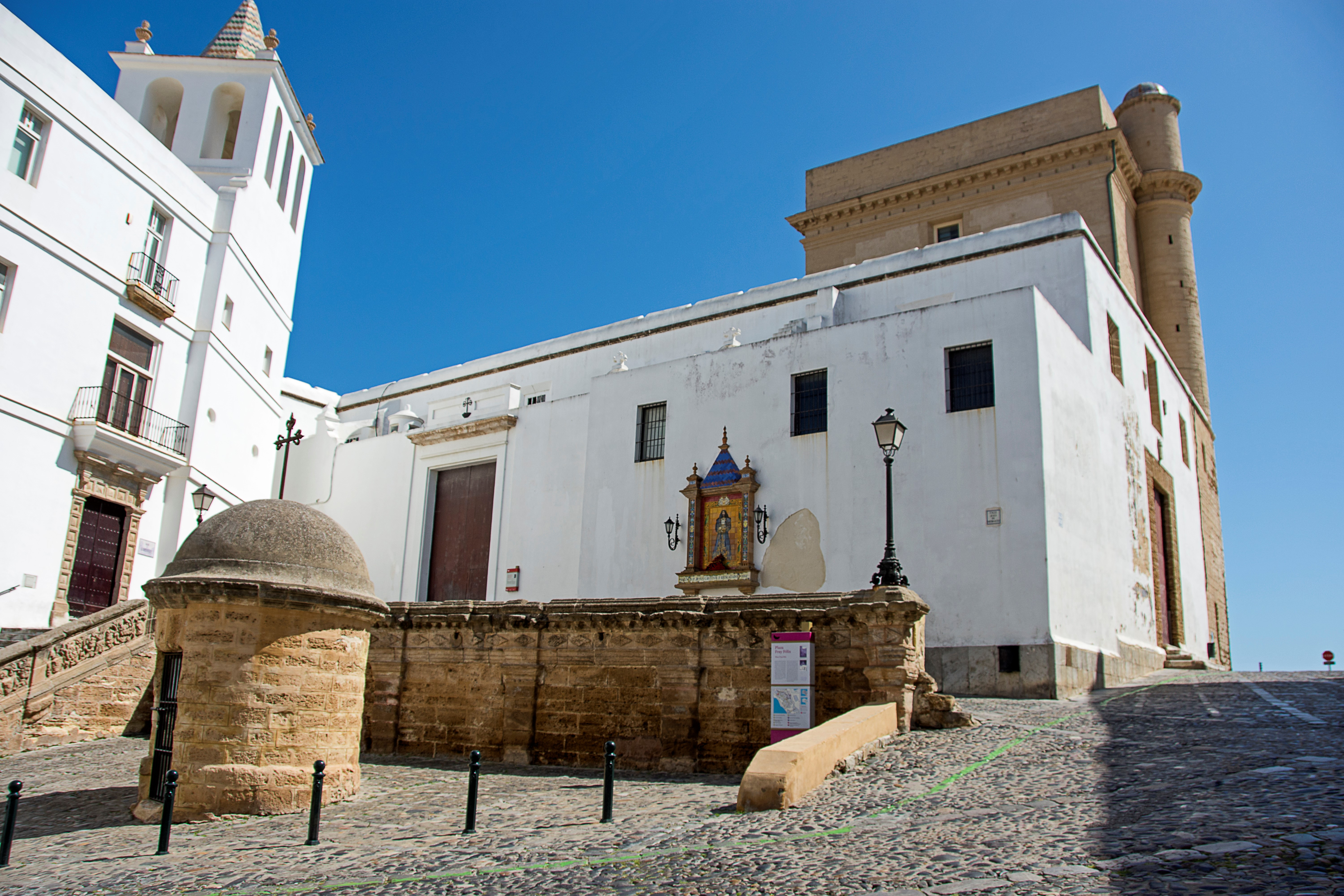 Plaza de Fray Félix (Cádiz)